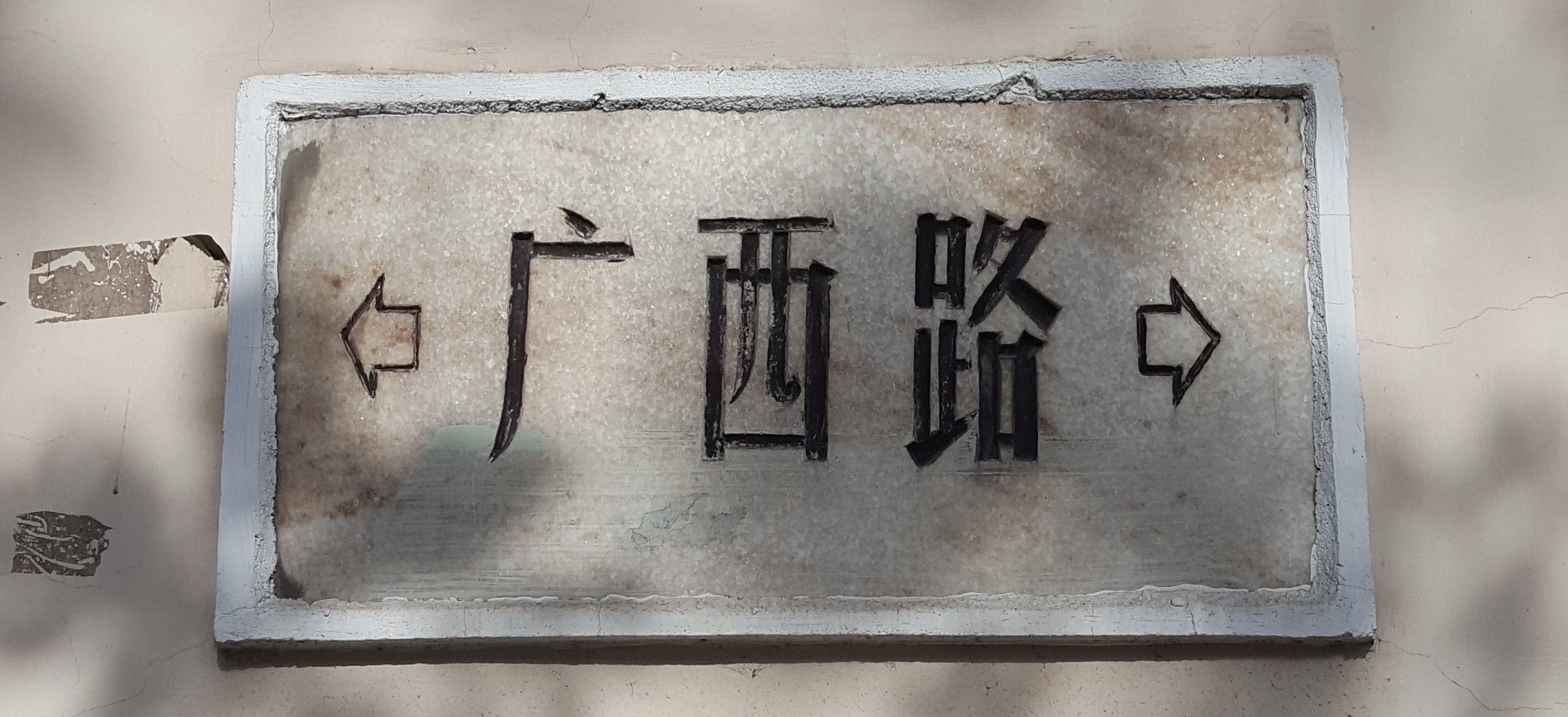 广西路老路牌